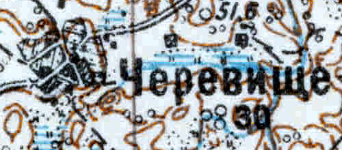 Топографическая карта Ленинградской области, квадрат VIc-28 (Луга), деревня Червищи